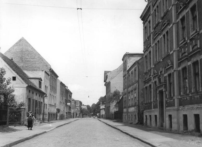 Guben, Mittelstraße Zentralbild Schwadten 9 Motive 29.6.1955 Guben - Die Geburtstadt unseres Präsidenten Wilhelm Pieck. Eine alte Straße, die Mittelstraße.